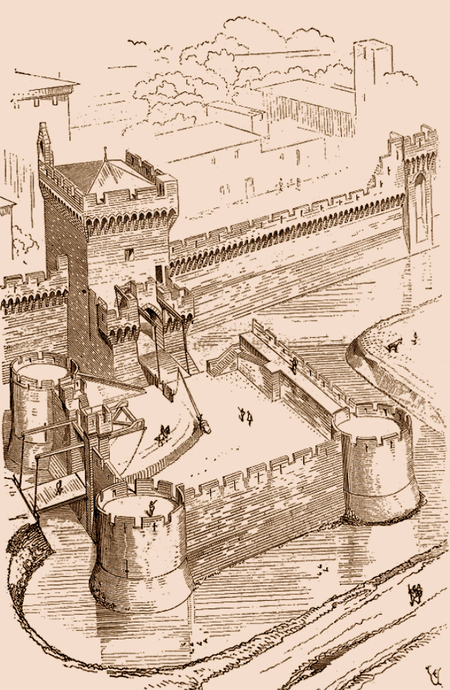 Porte des remparts d'Avignon protégée par ses douves, sont pont-levis et son révelin